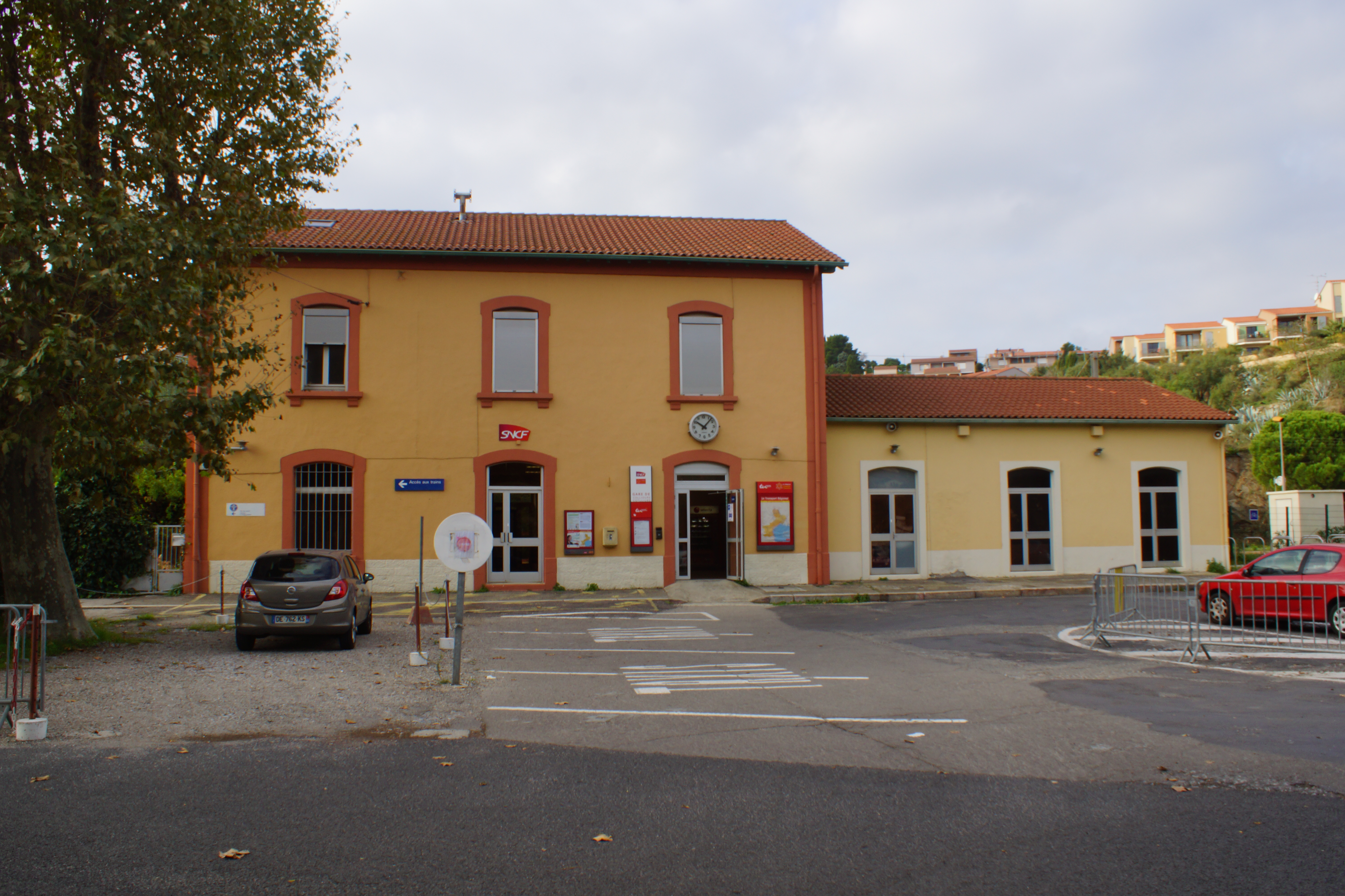 Gare de Collioure : bâtiment voyageurs et entrée de la gare.